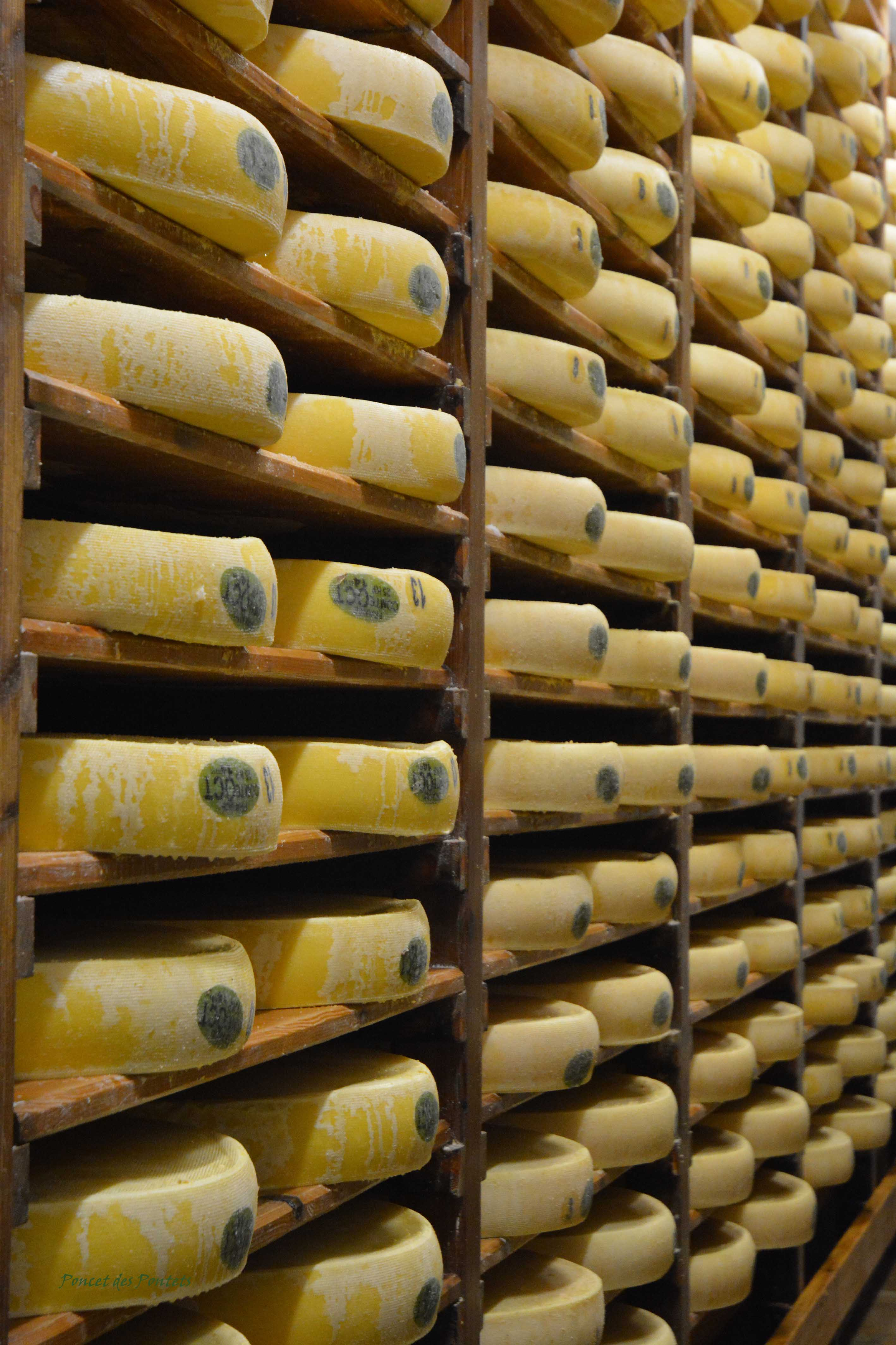 LES PONTETS F25240